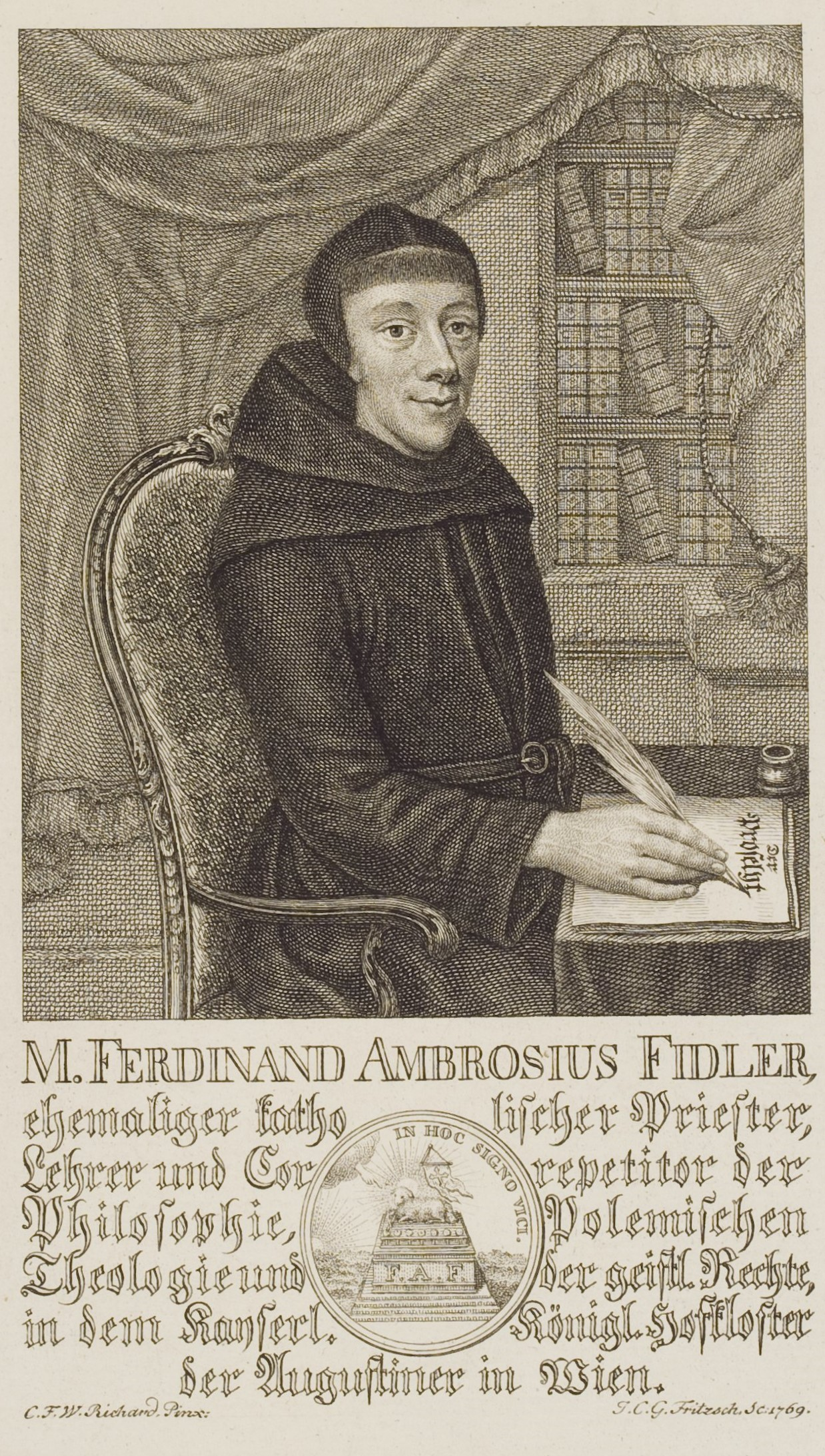 Ferdinand Ambrosius Fidler, Kupferstich von Johann Christian Gottfried Fritzsch nach einem Gemälde von Carl Friedrich Wilhelm Richard, 1769; Porträtsammlung der Herzog August Bibliothek Wolfenbüttel, inv. Nr. I 4222